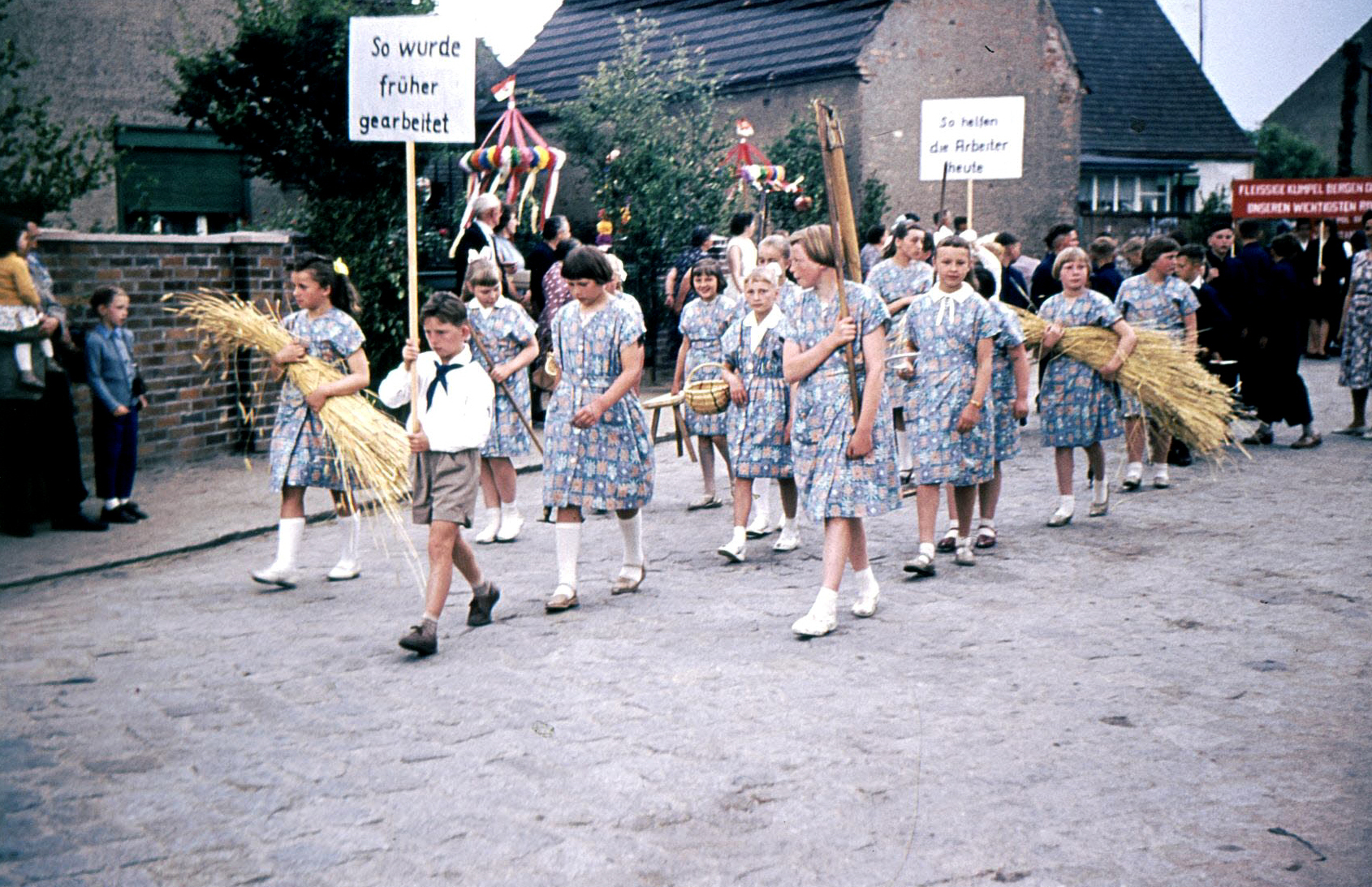 Fest-Umzug Biehla